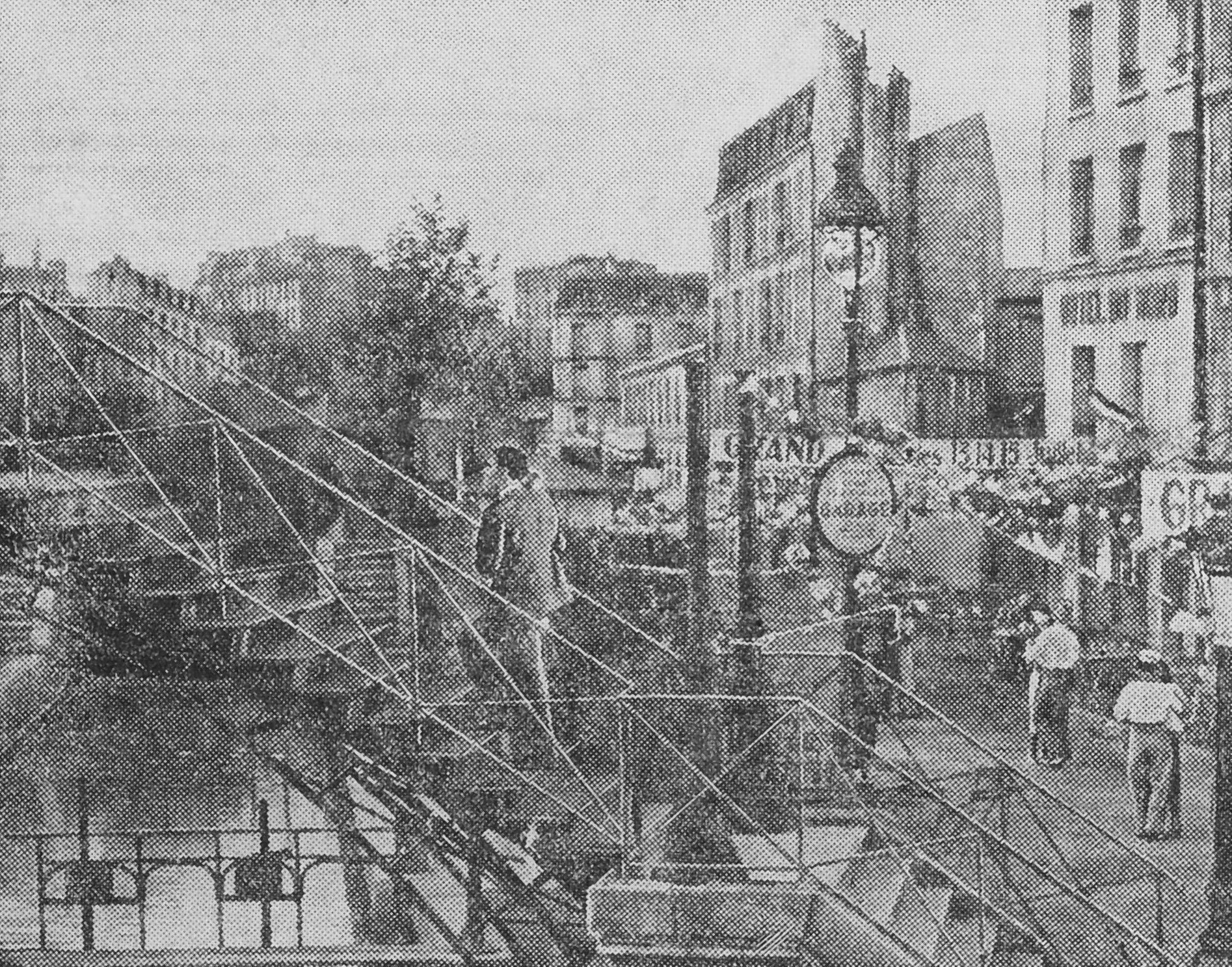 « L'Hôtel du Nord tel que l'a vu Marcel Carné », reproduction de la dernière scène du film - llustration de la coupures de presse « Lettre à Eugène Dabit par Henri Jeanson » (publiée dans Les Nouvelles Littéraires du 24 décembre 1938)